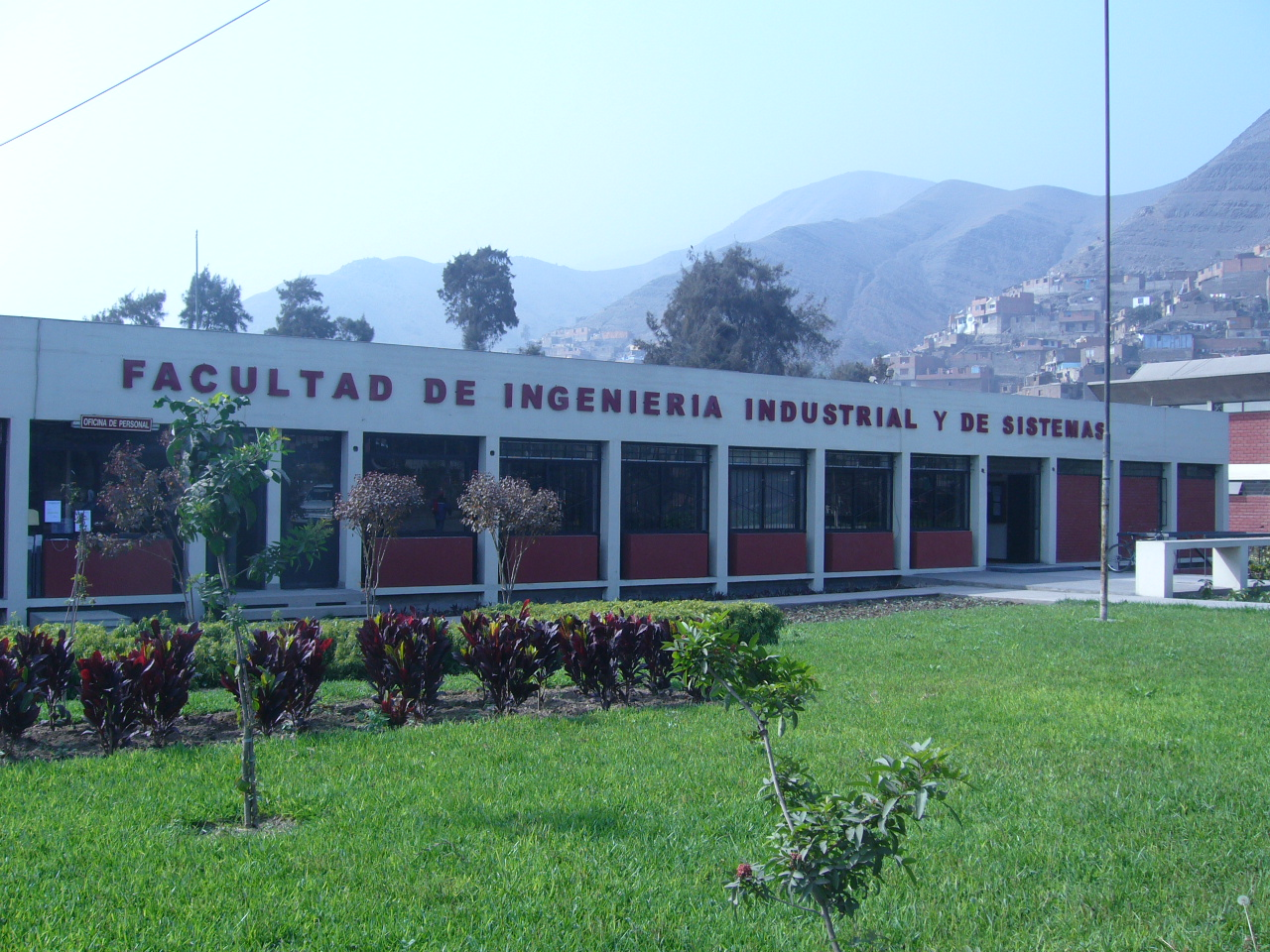 Facultad de Ingeniería Industrial y de Sistemas de la Universidad Nacional de Ingeniería - Lima, Perú